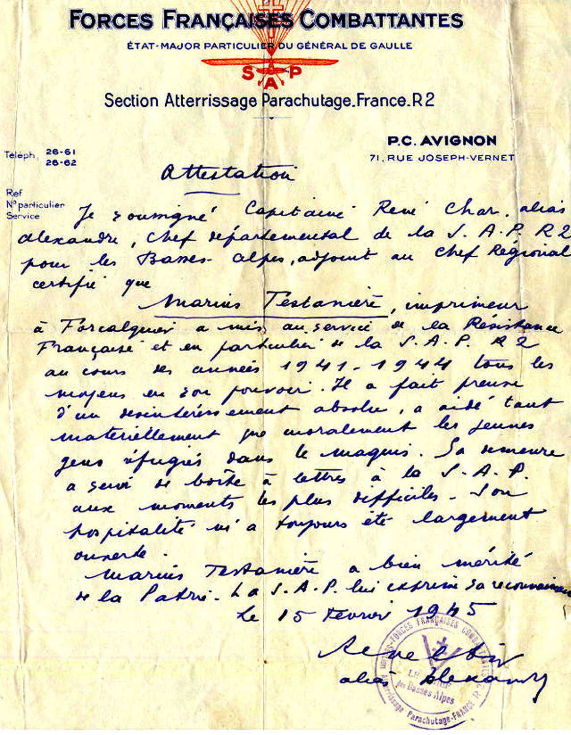 Certificat délivré par René Char